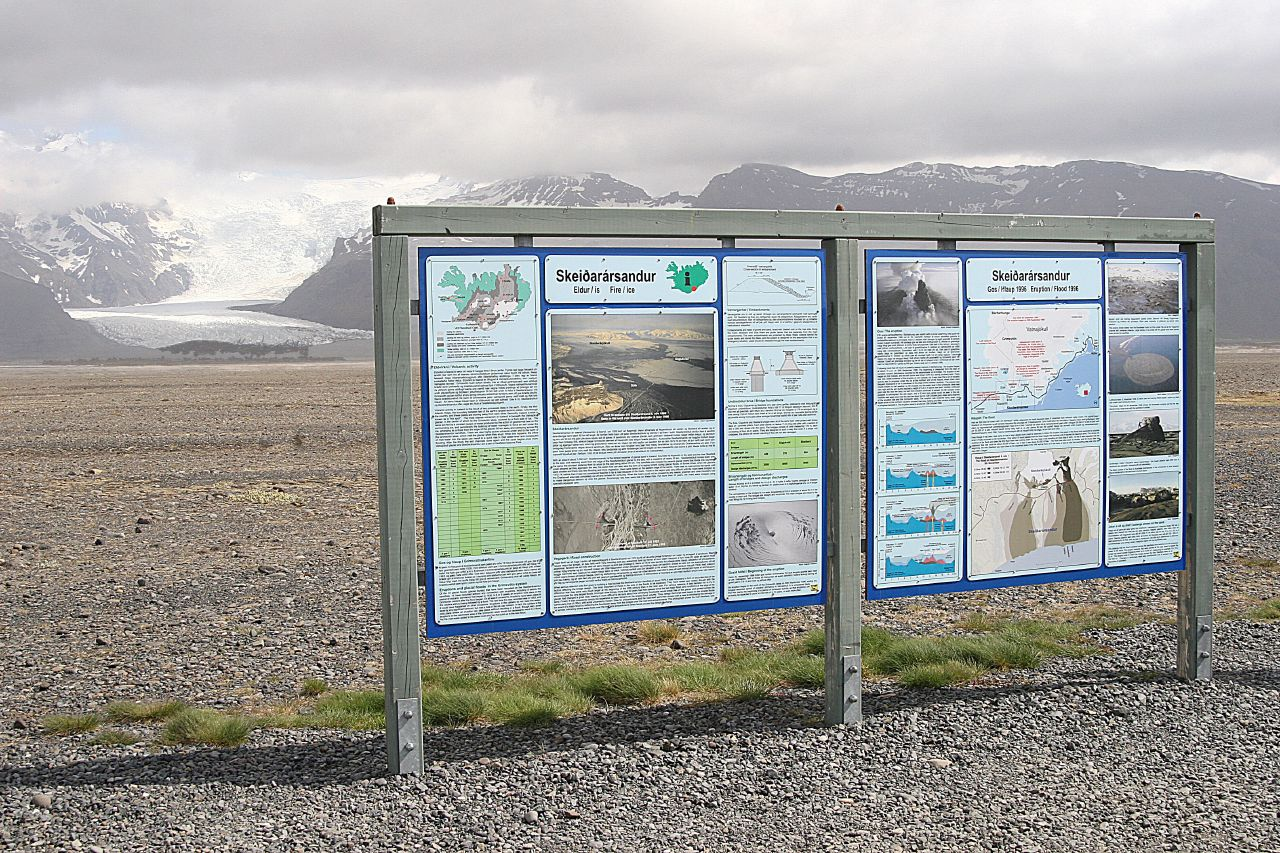 Island dag 2. Skaftafell National Park. Glaciären Svinafellsjökull i bakgrunden.